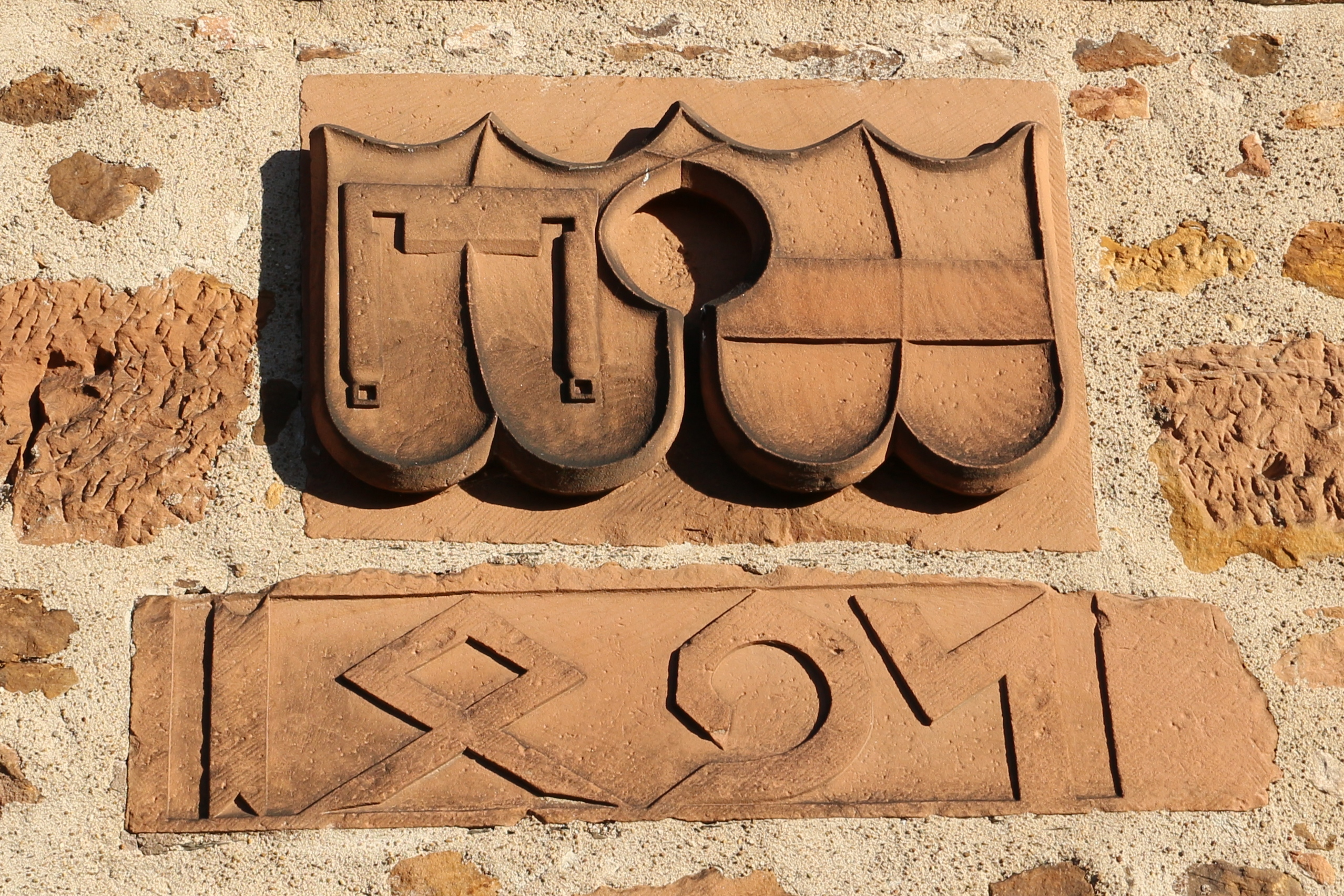 Evangelische Kirche Kirchberg (Lahn)